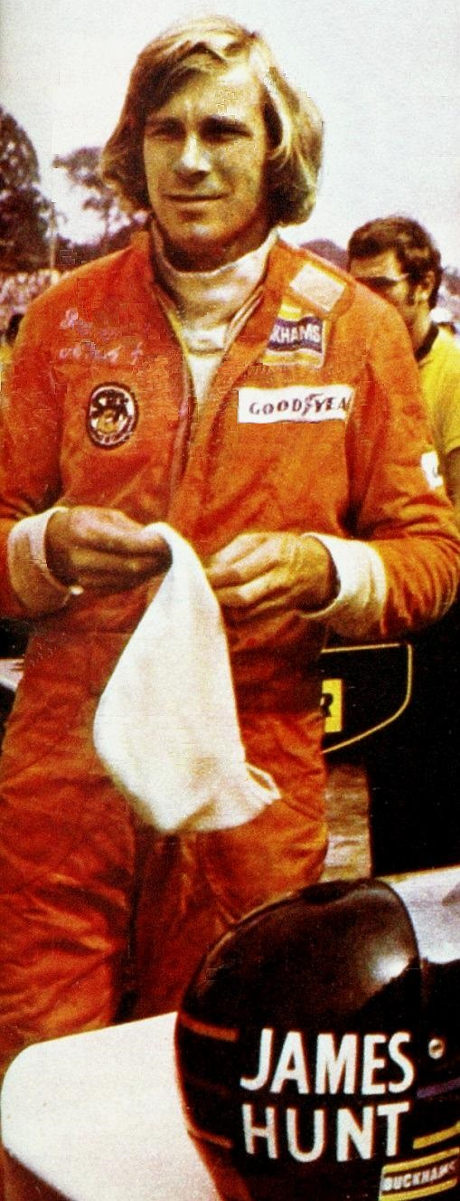 James Hunt (automovilismo) - El Grafico del 26 de Octubre de 1976. Edicion 2977